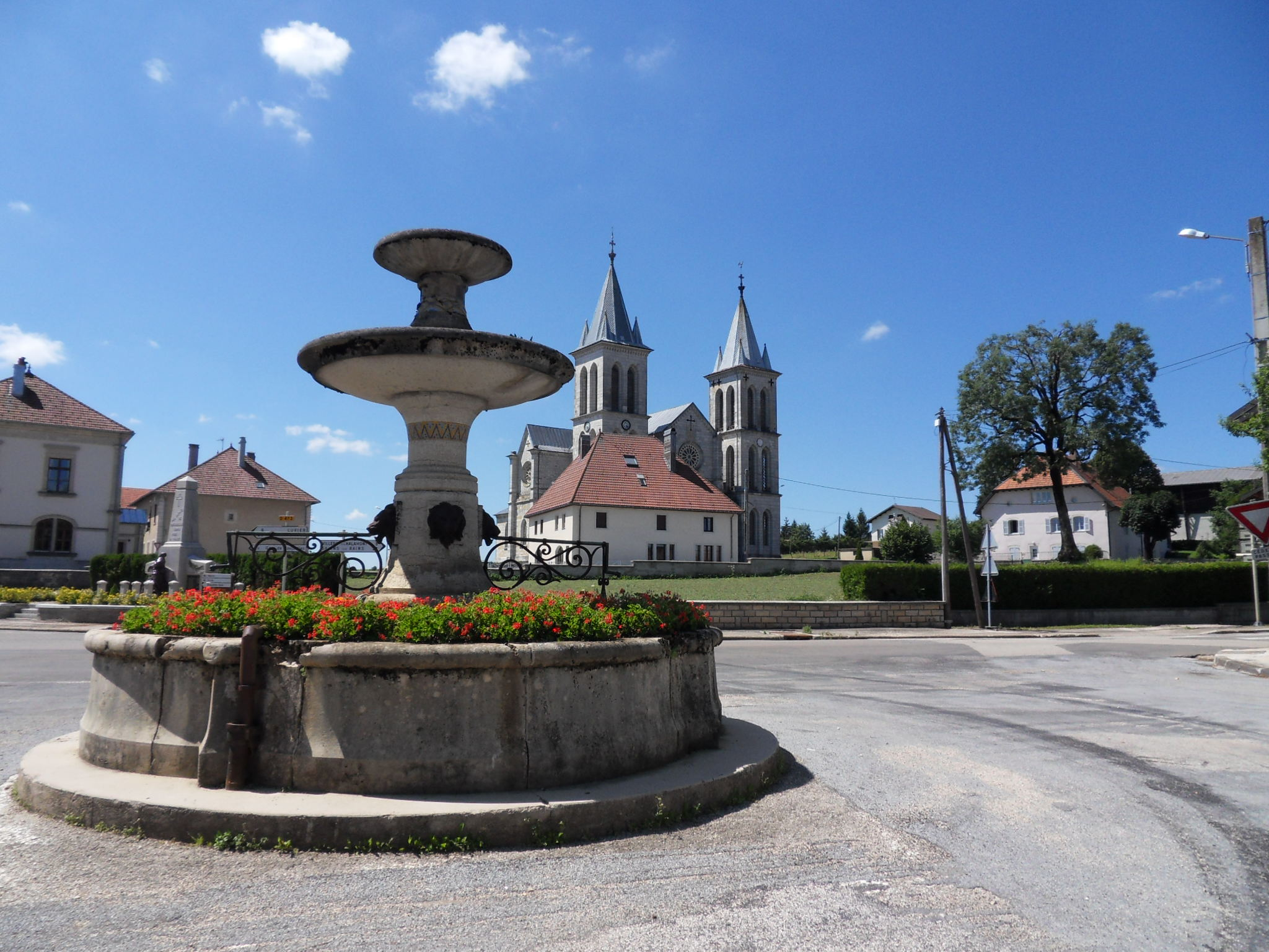 Église de Boujailles Région de Franche-Comté. Département du Doubs